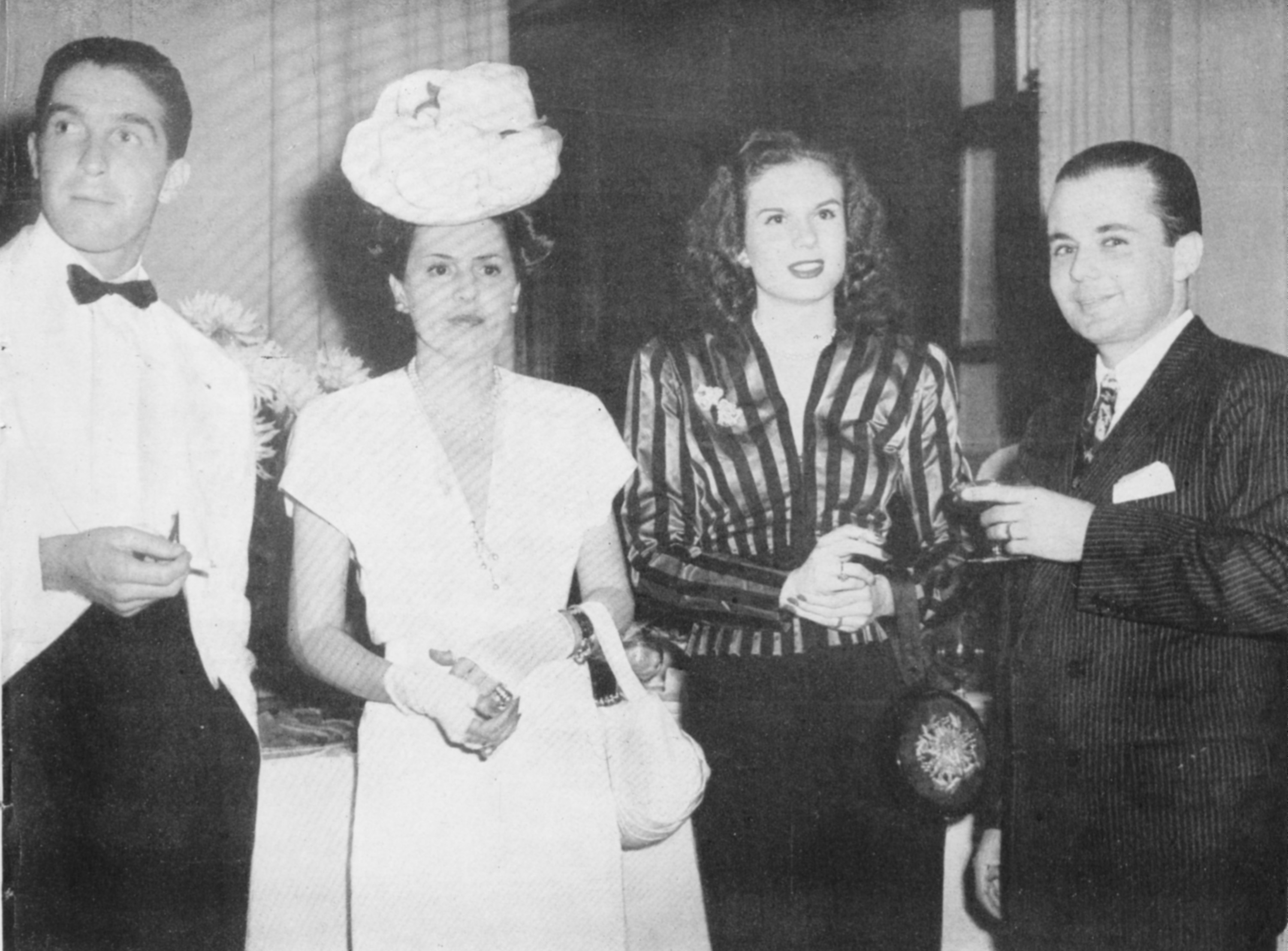 Reunião social no Copacabana Palace, Rio de Janeiro, em despedida do comandante inglês Robert Amscott Wilson, na foto presentes o príncipe João, Nanette de Castro e o casal Jorginho Guinle.